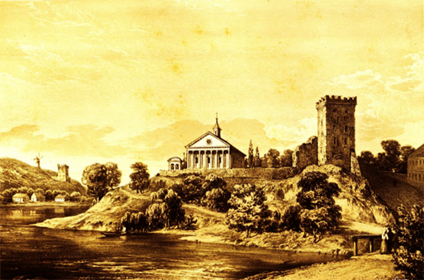 Білилівка. Мури замка, костел Мал. Наполеона Орди, 1870